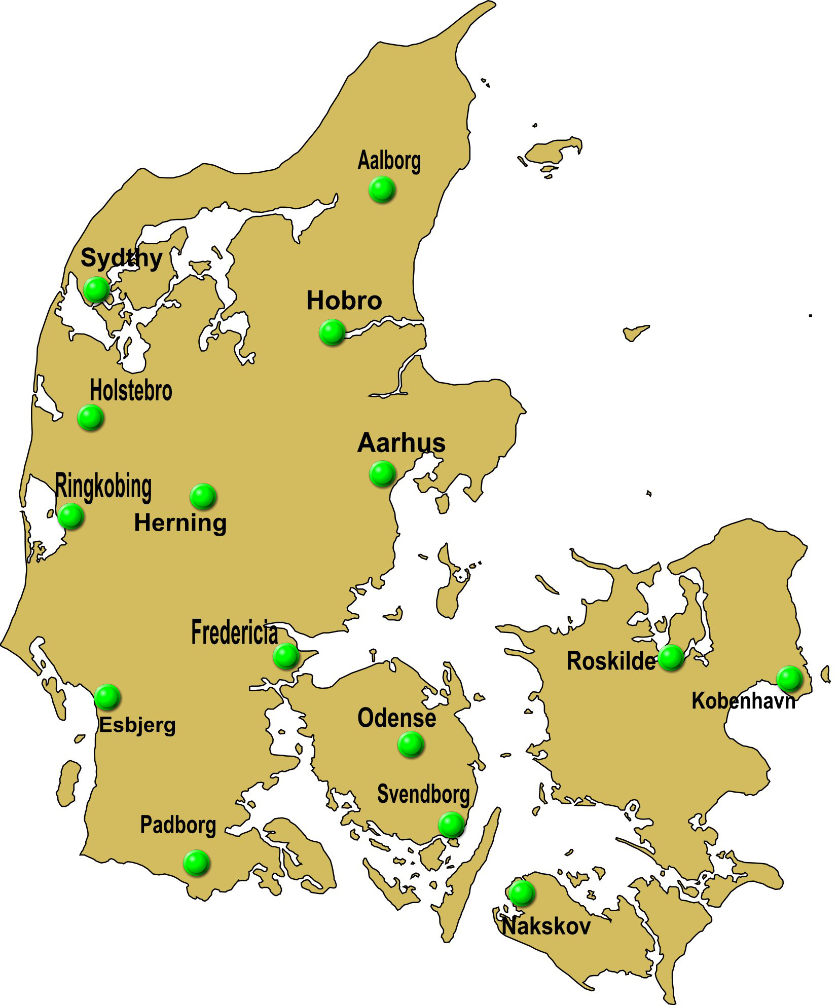 hydrogenlink.Denmark